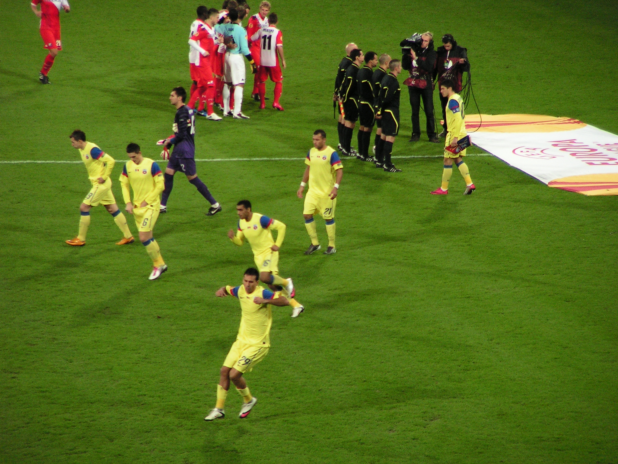 FC Utrecht - Steaua Boekarest